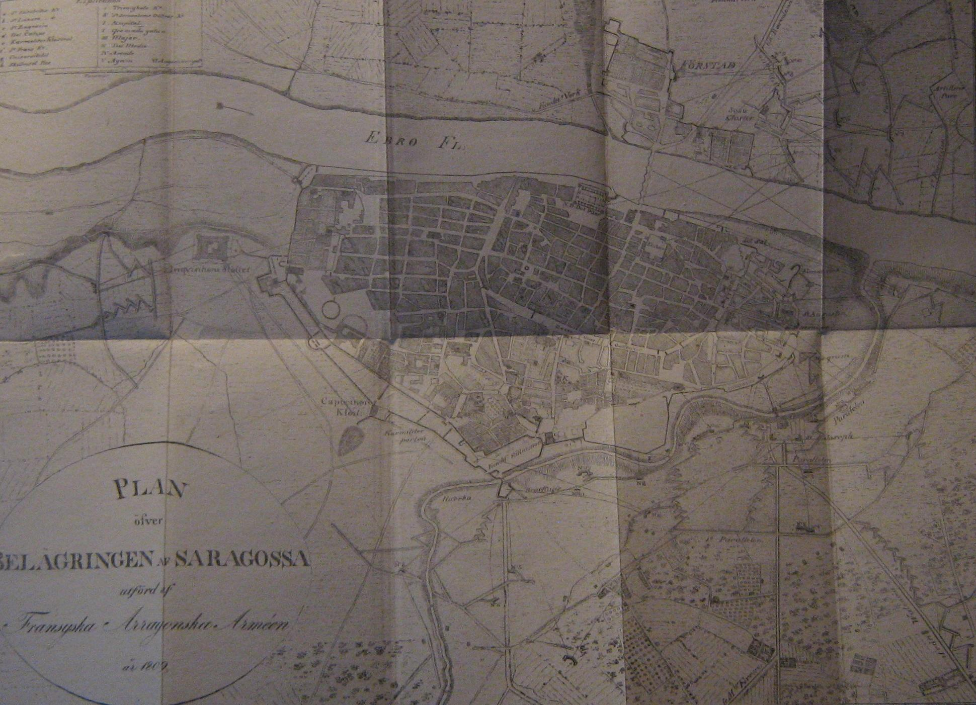 Illustration av Saragossa ur Berättelse om Saragossas och Tortosas belägring, av baron Rogniat, översättning från franskan av Gustav Mongomery, tryckt i Stockholm 1820.